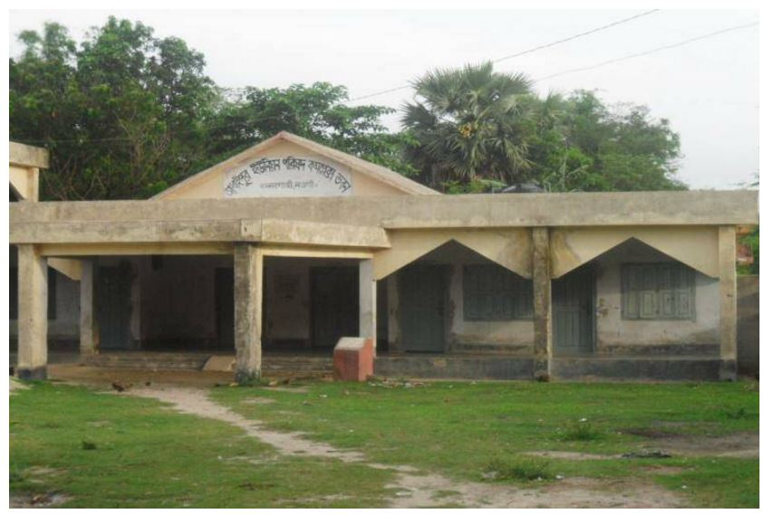 আধাইপুর ইউনিয়ন পরিষদ